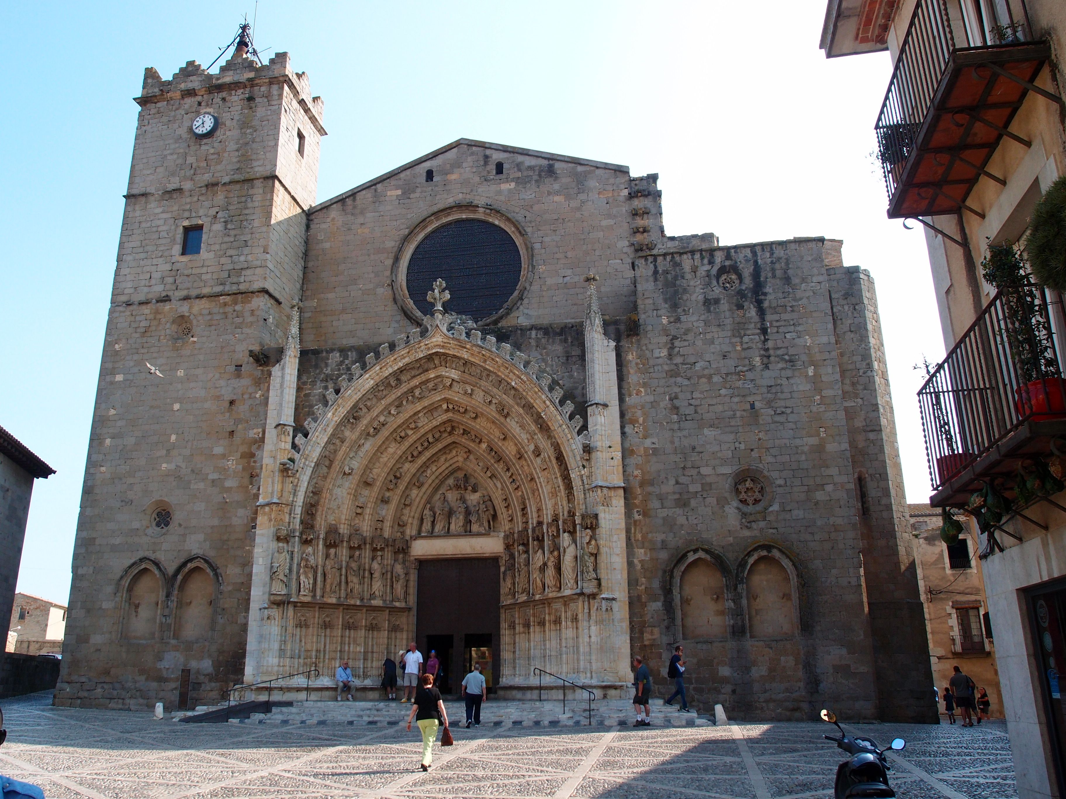 Basílica de Santa María (Castelló d’Empúries) - Katalonien/Spanien Datum: 29.09.2011 Urheber: M. Pfeiffer alias Gordito1869 Quelle: Privates Fotoarchiv des Urhebers